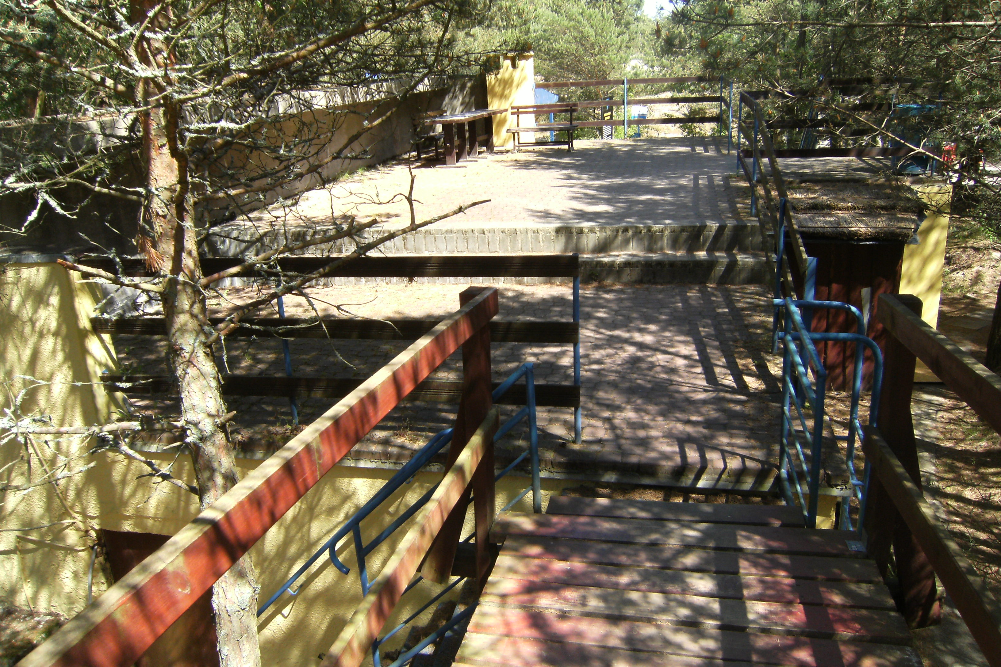 Leitbunker der Prüfstelle Rumbke